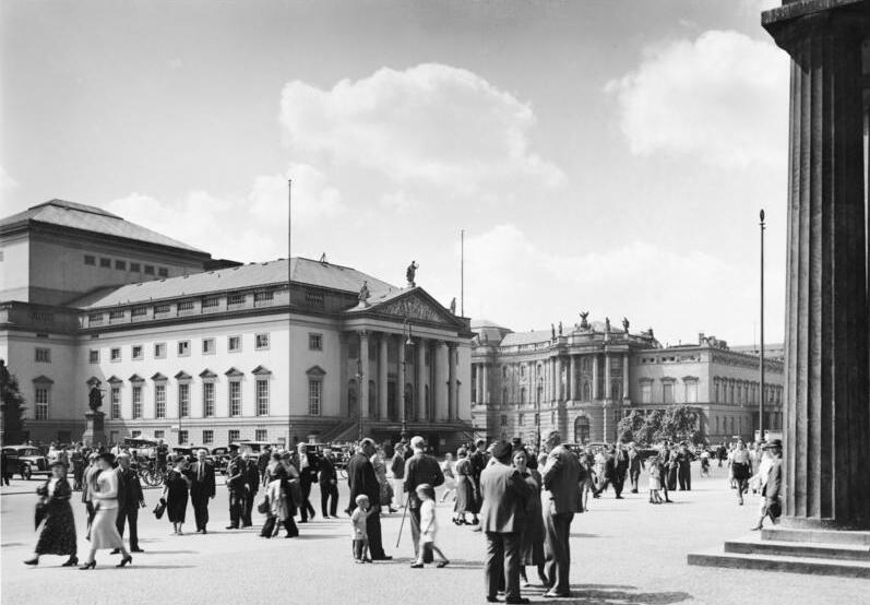 Berlin; Unter den Linden, zwischen Ehrenmal und Opernhaus